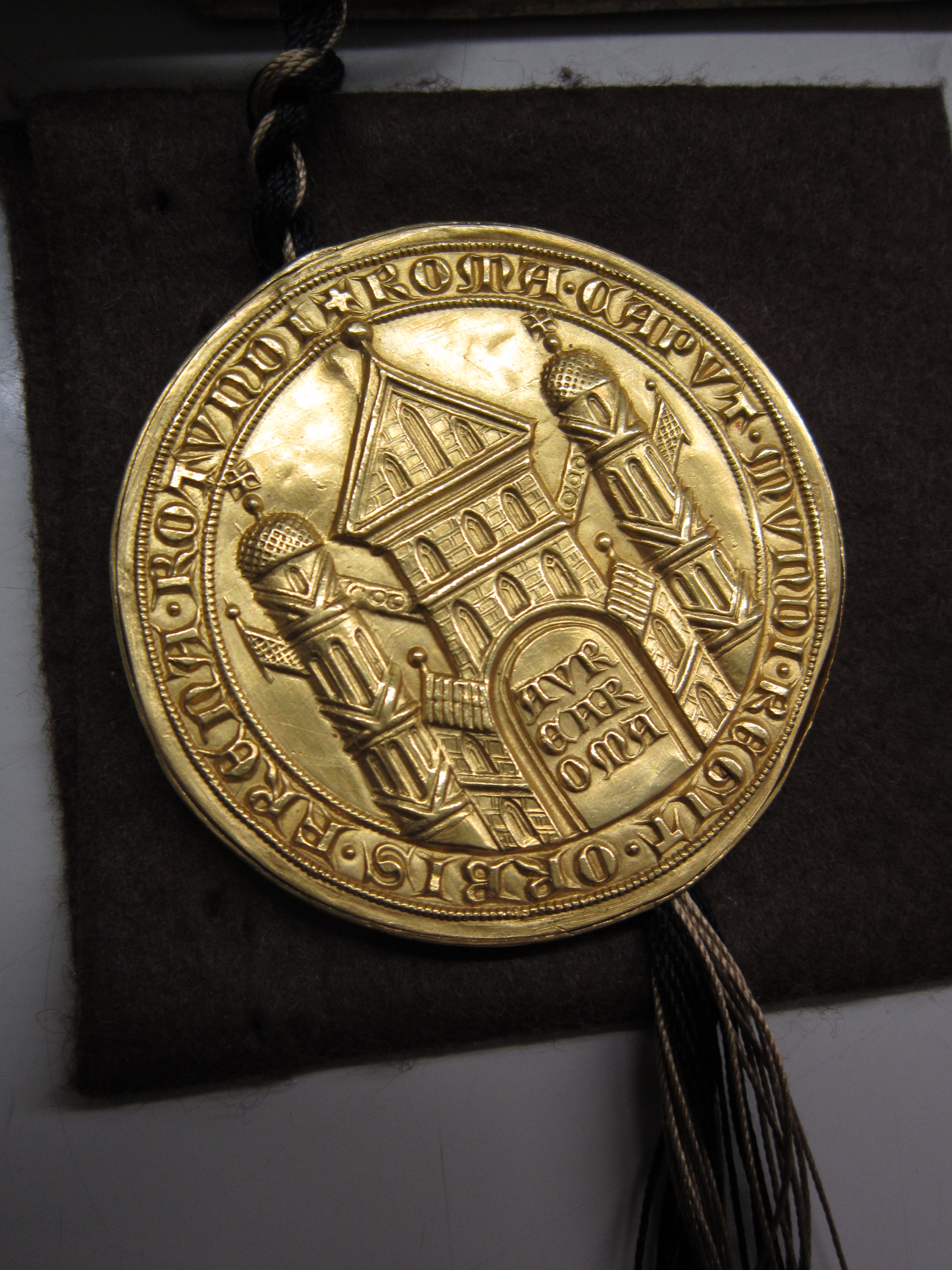 Rückseite des Siegels vom Trierer Exemplar der Goldenen Bulle mit stilisierter Darstellung Roms.